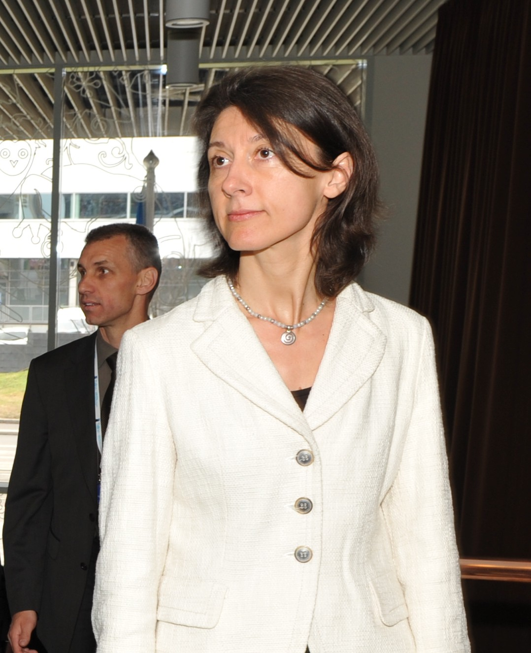 Kadri Liik